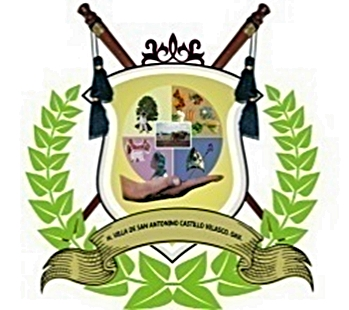 Escudo Municipal de San Antonino Castillo Velasco, Ocotlán, Oaxaca